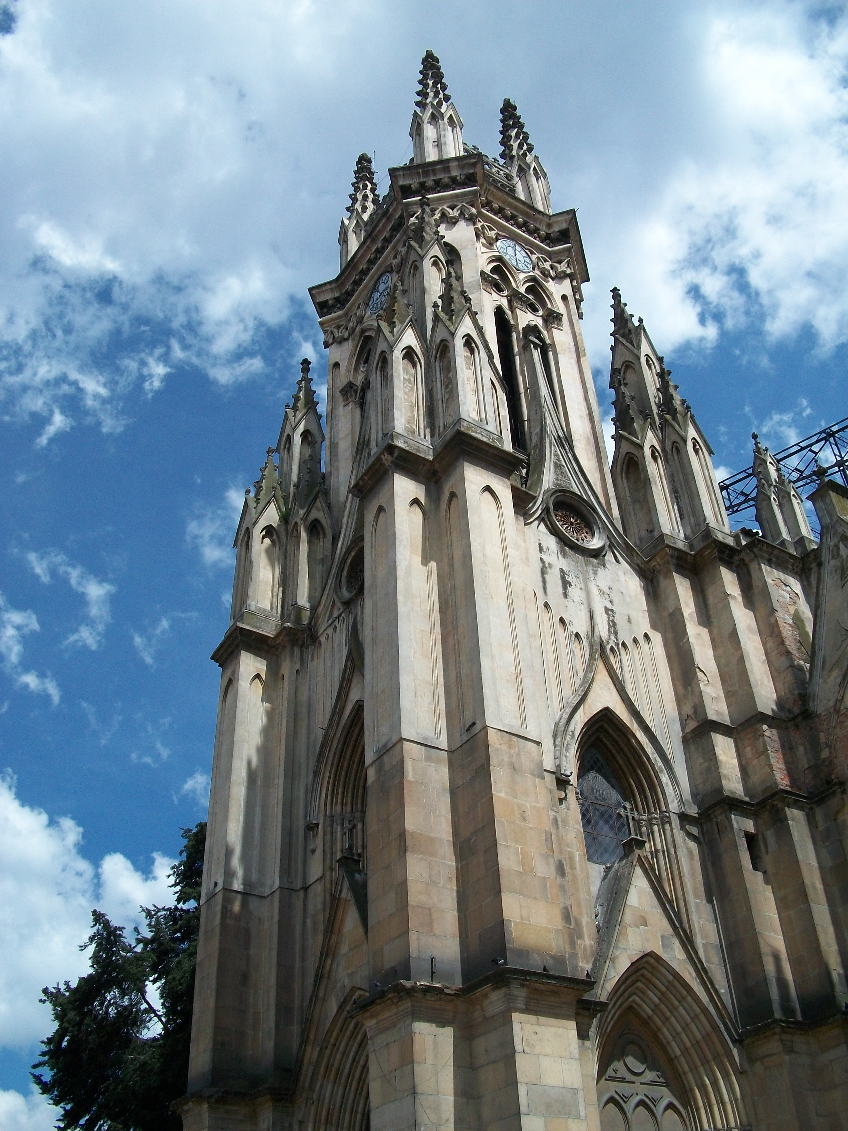 Nuestra Señora de Lourdes; Calle 63A 10 09, Chapinero, Bogotá D.C.